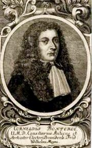 Porträt des Artzes Cornelius Bontekoe